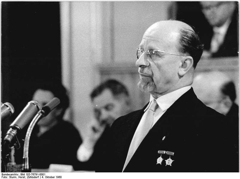 Zentralbild-Sturm-Zühlsdorf- 4.10.1960 15. Sitzung der Volkskammer der DDR Im In- und Ausland mit größtem Interesse erwartet, ist die Volkskammer der Deutschen Demokratischen Republik am 4.10.1960 um 11.00 Uhr zu ihrer 15. Sitzung zusammengetreten. Auf der Tagesordnung stehen eine Erklärung des Staatsrates der Republik, das "Gesetz über die Anpassung von gesetzlichen Bestimmungen an die Bildung des Staatsrates der Deutschen Demokratischen Republik" in erster und zweiter Lesung sowie Anzeigen des Ausschusses für Eingaben der Bürger. UBz. Der Vorsitzende des Staatsrates der DDR, Walter Ulbricht, gibt vor der Volkskammer eine programmatische Erklärung ab.